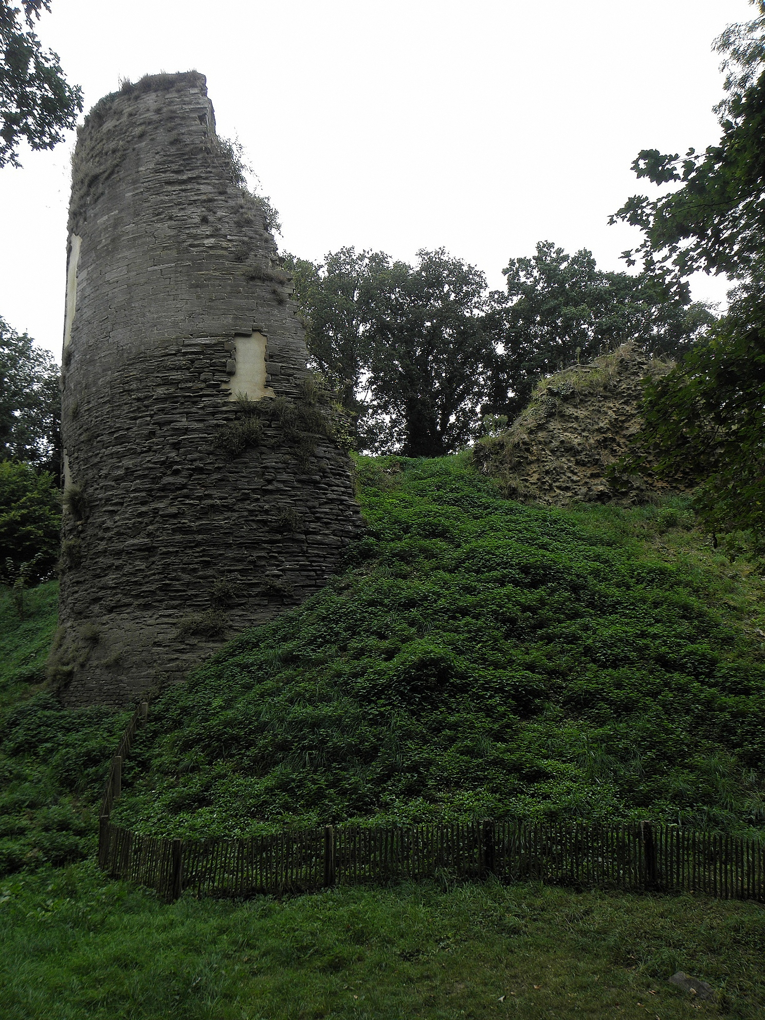 Ruines du donjon du château de Penhoat en Saint-Thégonnec (29). .